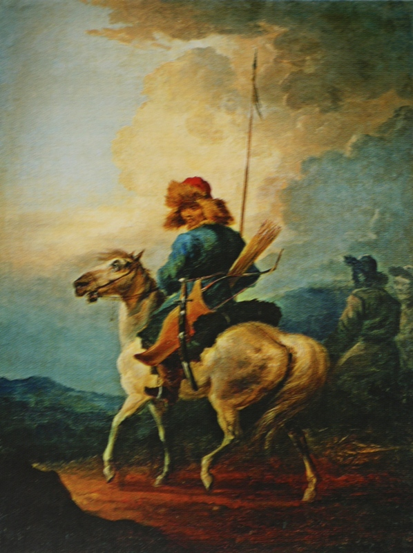 Башкир верхом. Конец 1800-х – около 1810-х. Худ. А.О.Орловский. Государственная Третьяковская галерея. Москва.